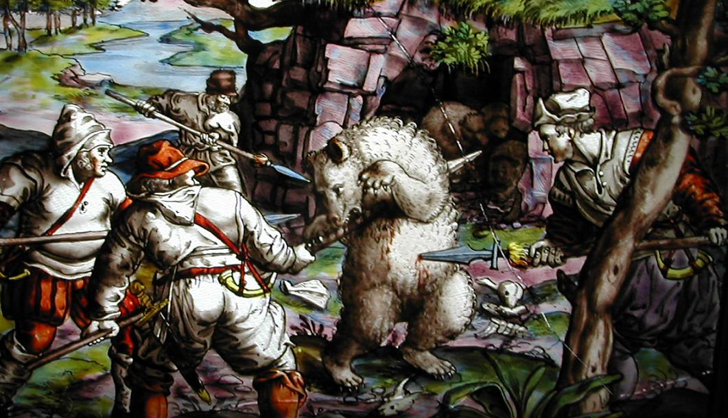 Escena de la caza medieval del oso pardo.